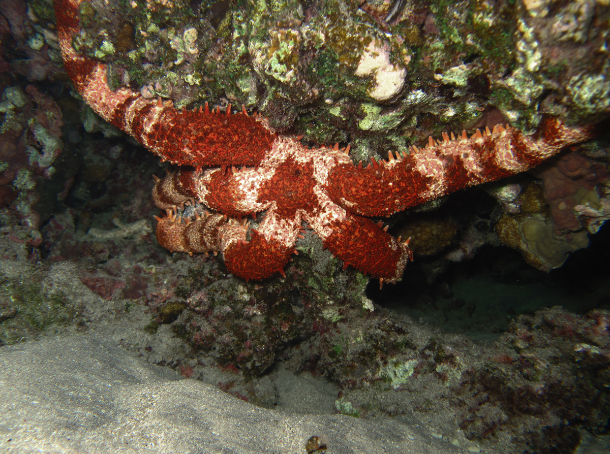 Une "étoile cloutée" (Mithrodia clavigera) à la Réunion.